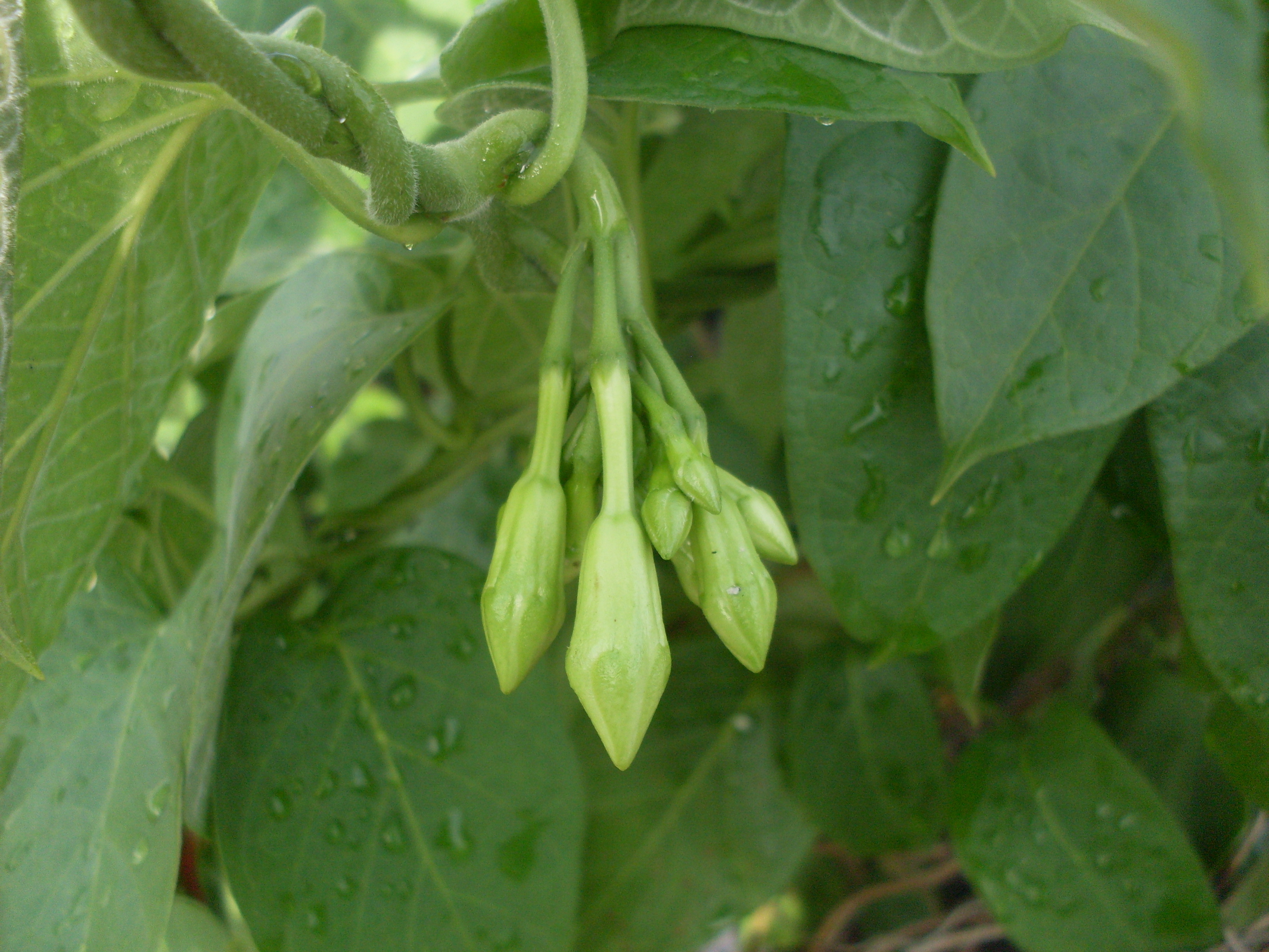 Loroco nativo de El Salvador 1